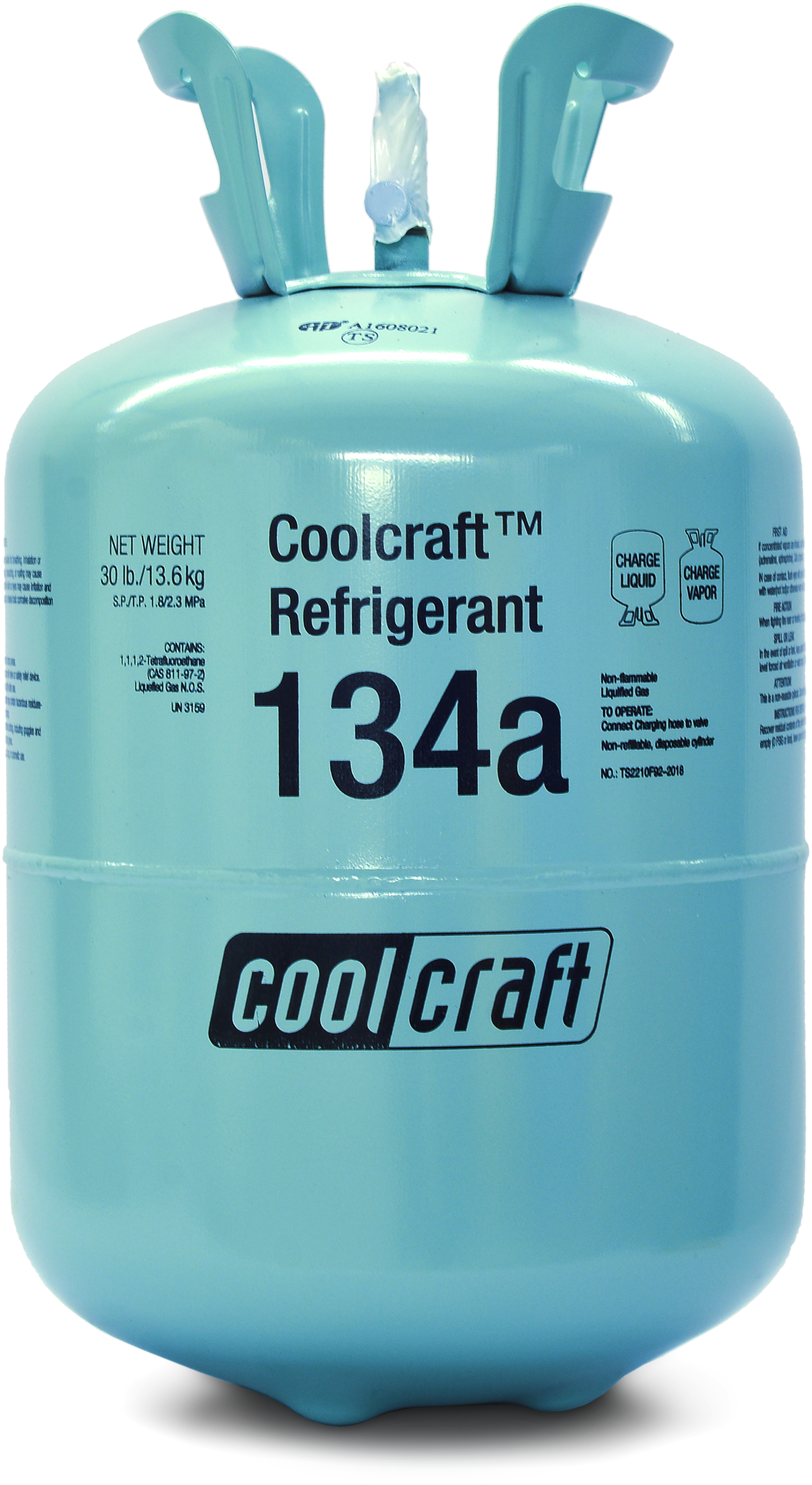 Сосуд с хладагентом 134a